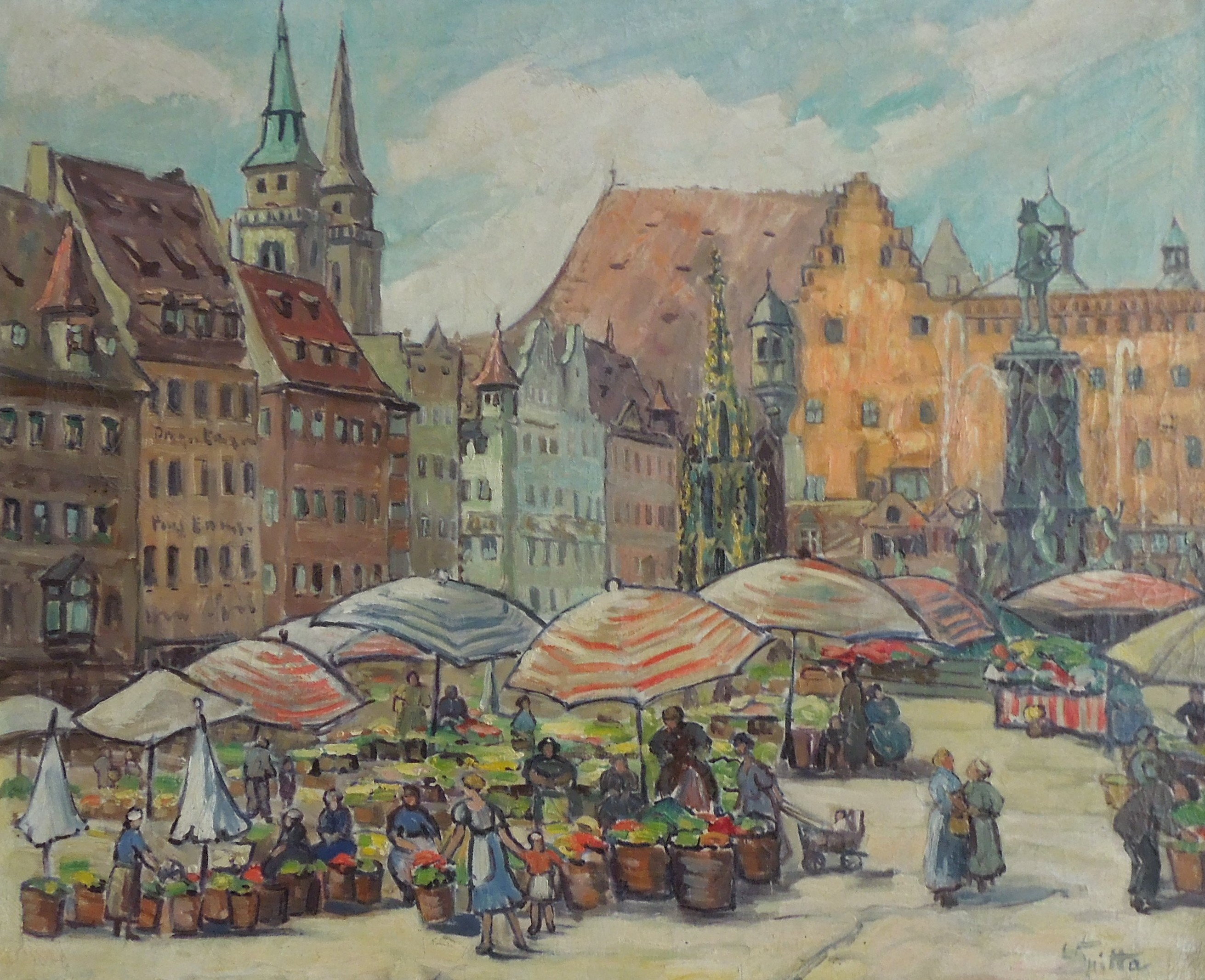 Das Gemälde zeigt den Hauptmarkt in Nürnberg.